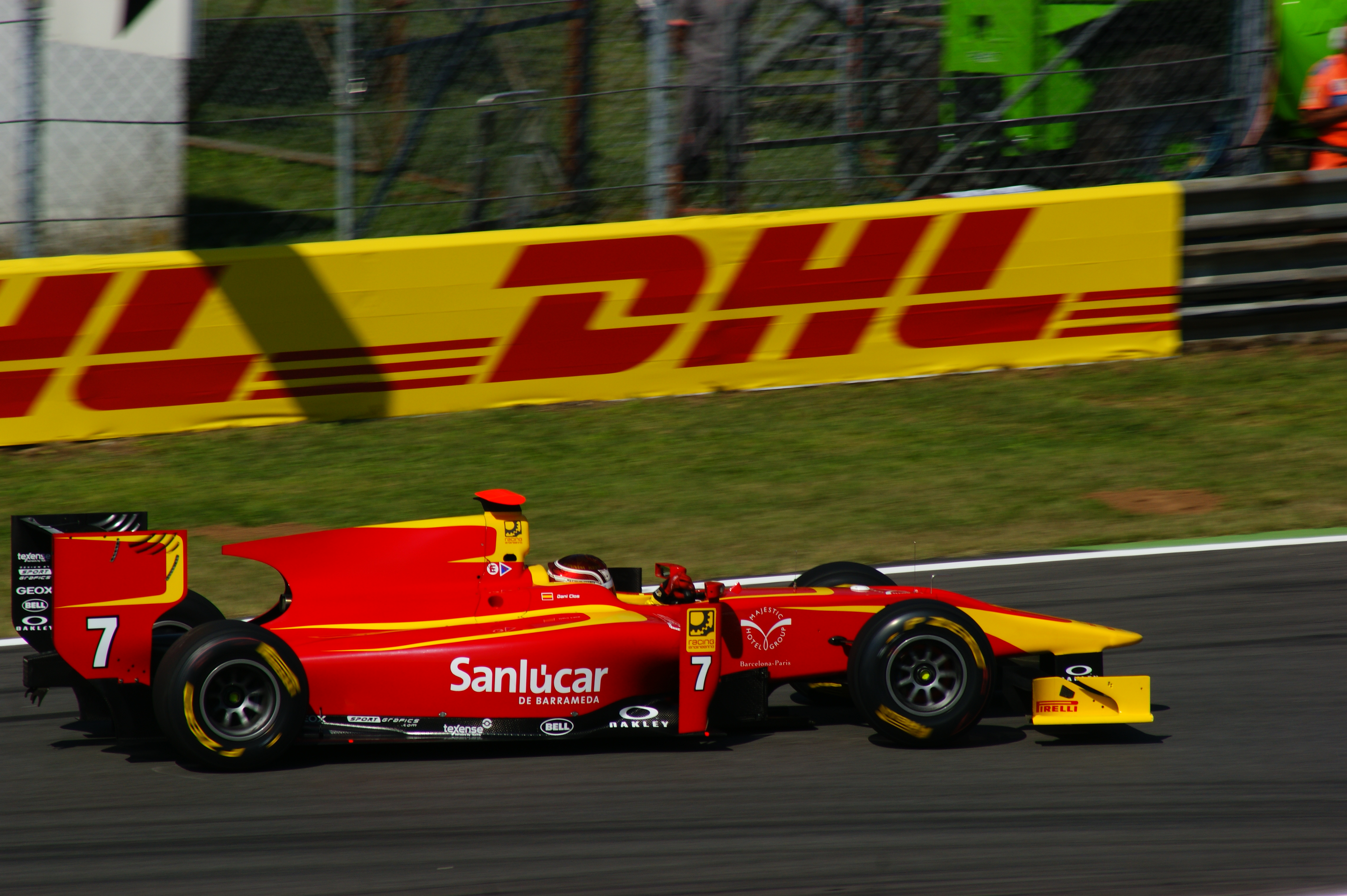 Dani Clos alla prima variante Monza 2011